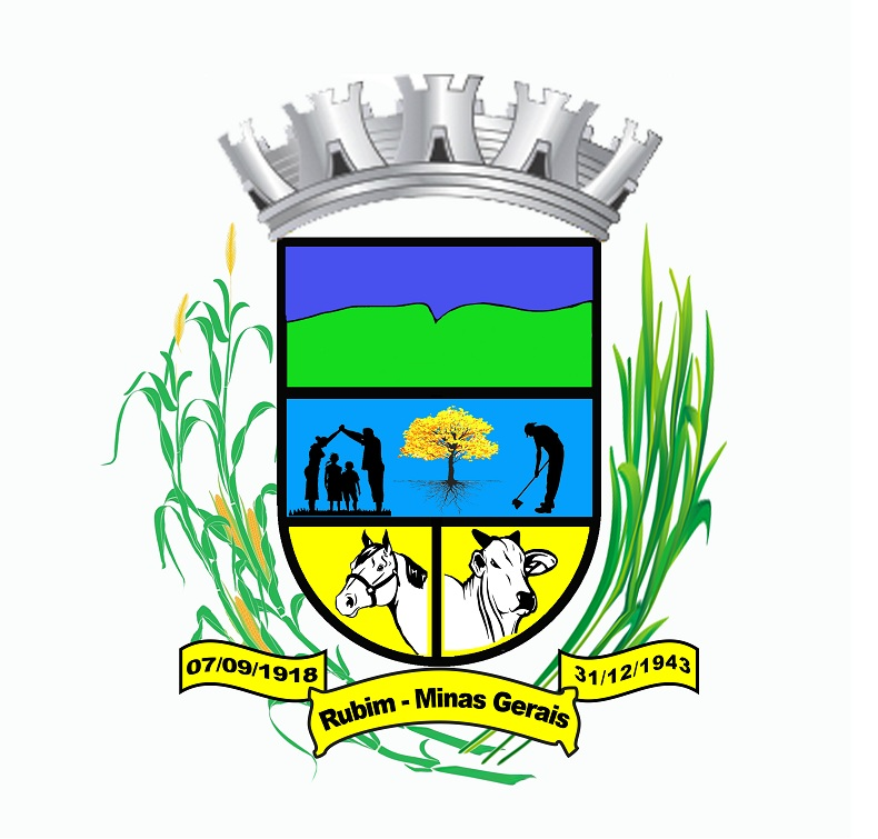 Português do Brasil: Brasão aprovado em 2018